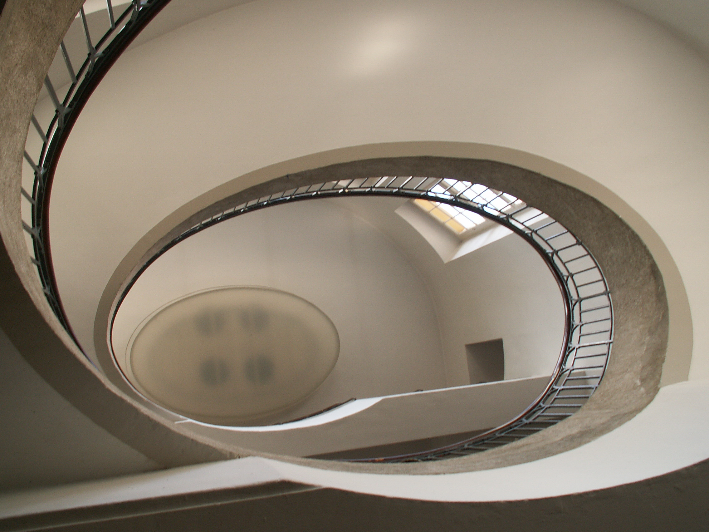 Weimar, Treppenhaus der Bauhausuniversität (Van de Velde-Bau, Geschwister-Scholl-Straße – Uni-Campus)